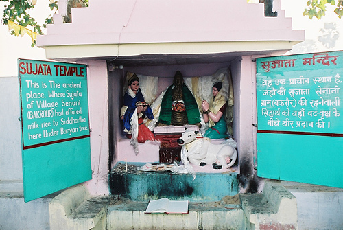 Tempio dedicato a Sujata a Bodhgaya